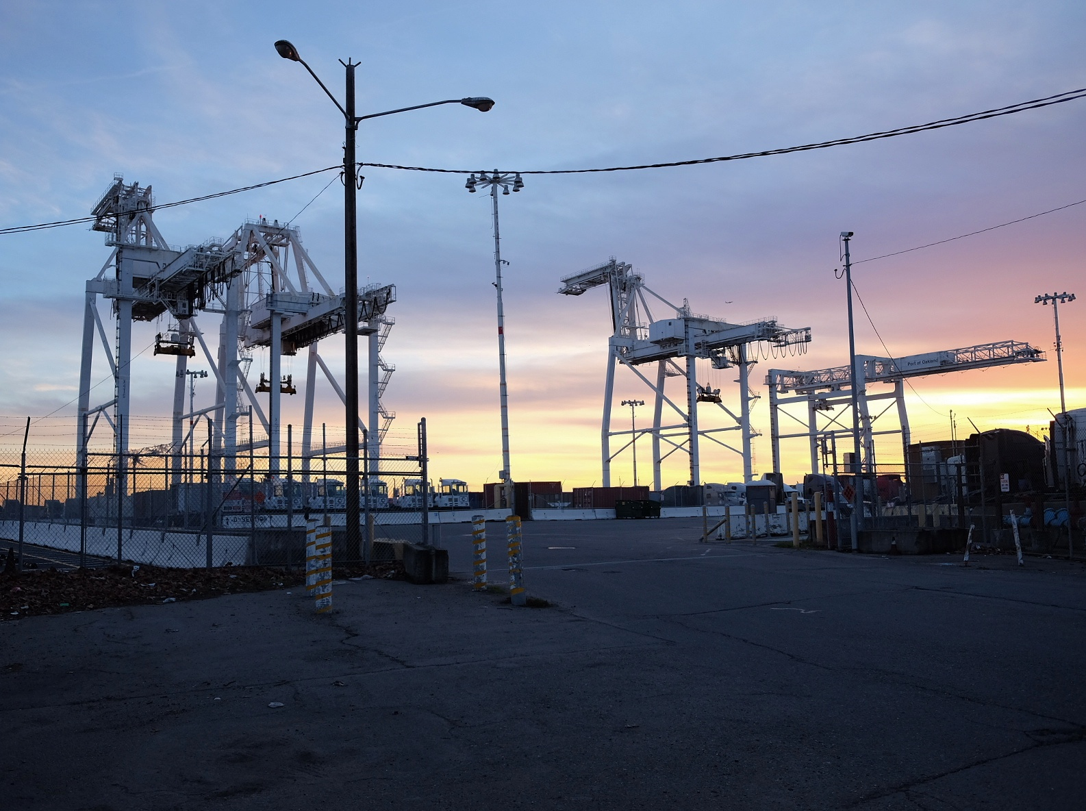 Lastkranar i skymning, Oakland, Howard Terminal, Oakland Inner Harbor.